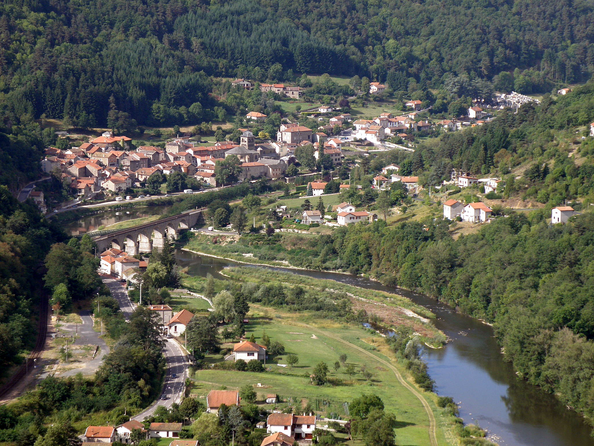 Chamalières-sur-Loire, comm. du départ. de la Haute-Loire, France (région Auvergne). Vue générale de la vallée de la Loire à Chamalières, prise depuis le château ruiné d'Artias (comm. de Retournac). Coup d'oeil (au téléobjectif) vers le sud-ouest. Au centre : village de Chamalières sur la rive droite (c'est-à-dire ici : sud) de la Loire, laquelle coule de la gauche vers le bord droit de la photo. On distingue facilement l’église prieurale Saint-Gilles au milieu du village. Le pont à arches est le pont ferroviaire de la ligne Saint-Étienne ― le Puy. Route de Retournac (D103) en bas à gauche.